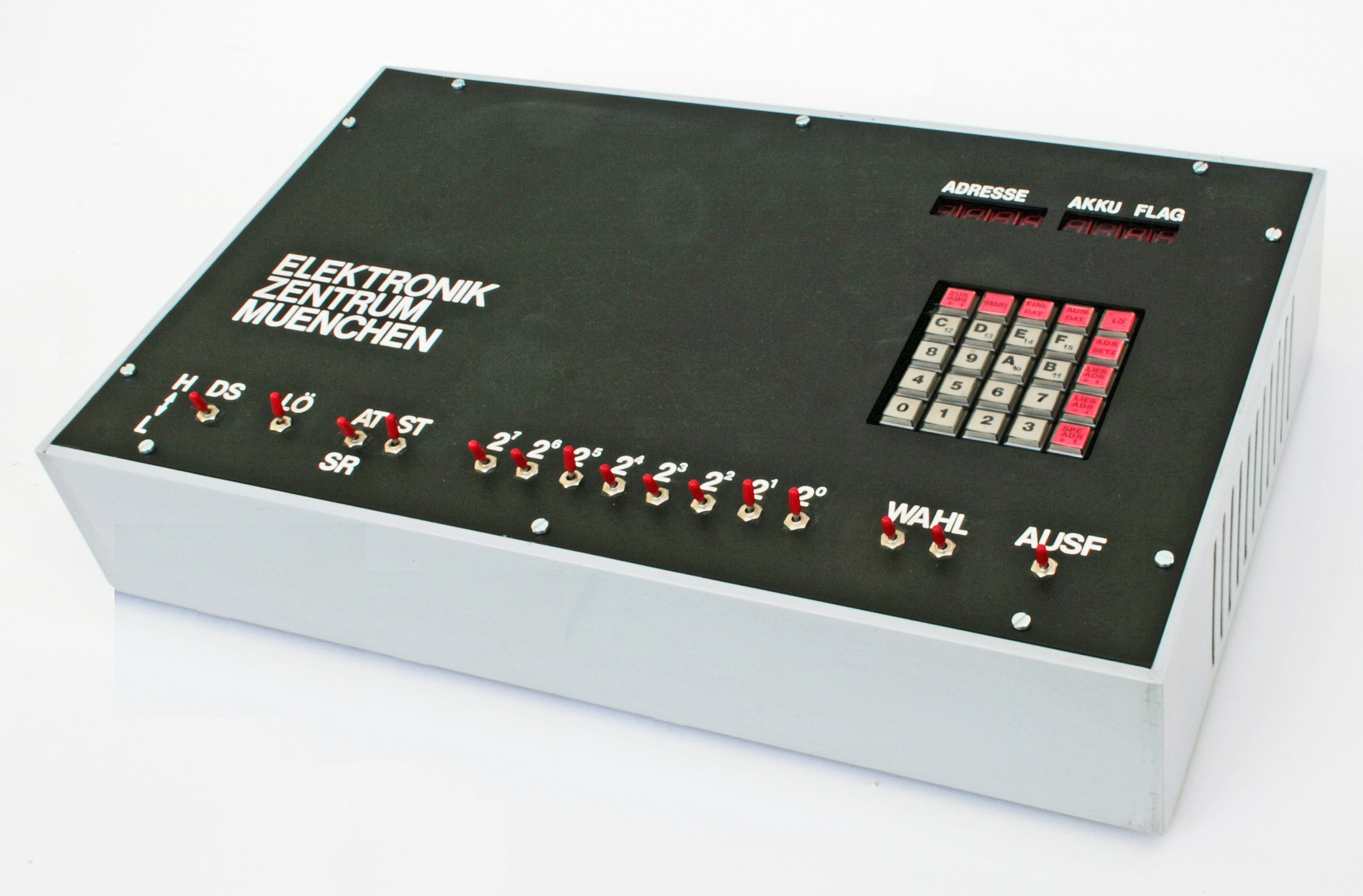 Prototyp (Einzelstück) des EZ80-DIT Mikrocomputers